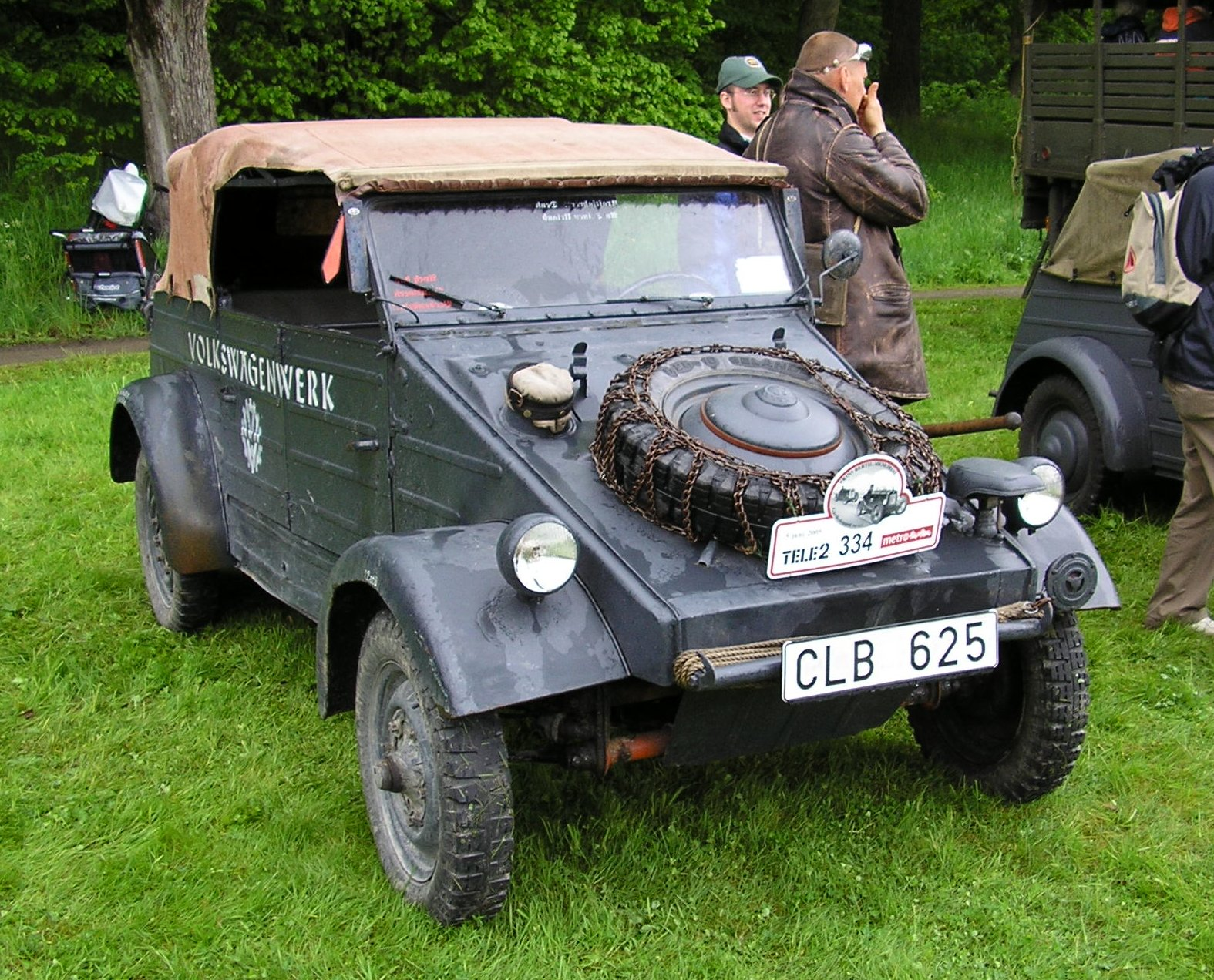 A 1951 VW Kübelwagen (LIM 111).